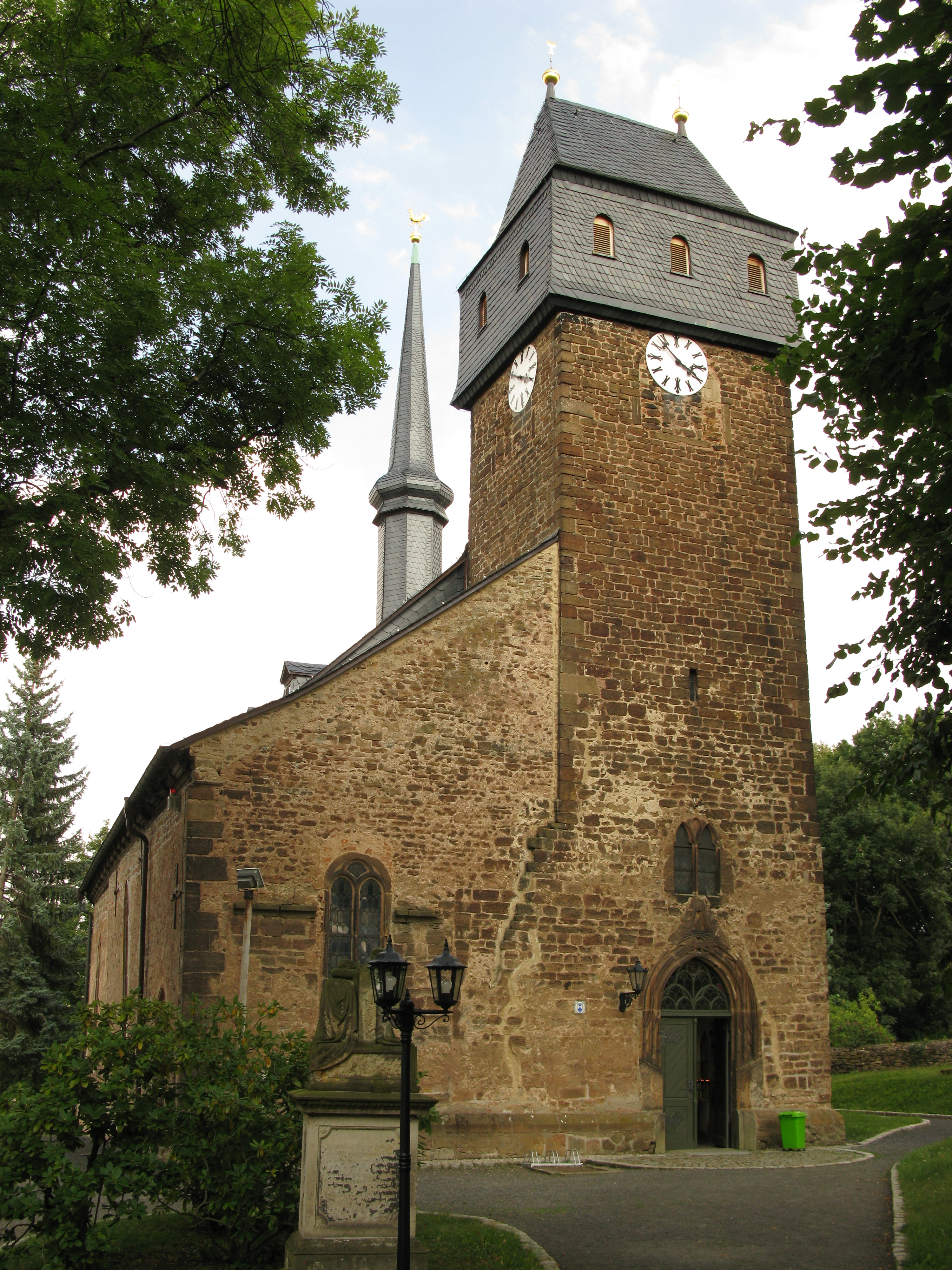 Außenansicht der Pfarrkirche St. Veit in Wünschendorf/Elster (Ortsteil Veitsberg)